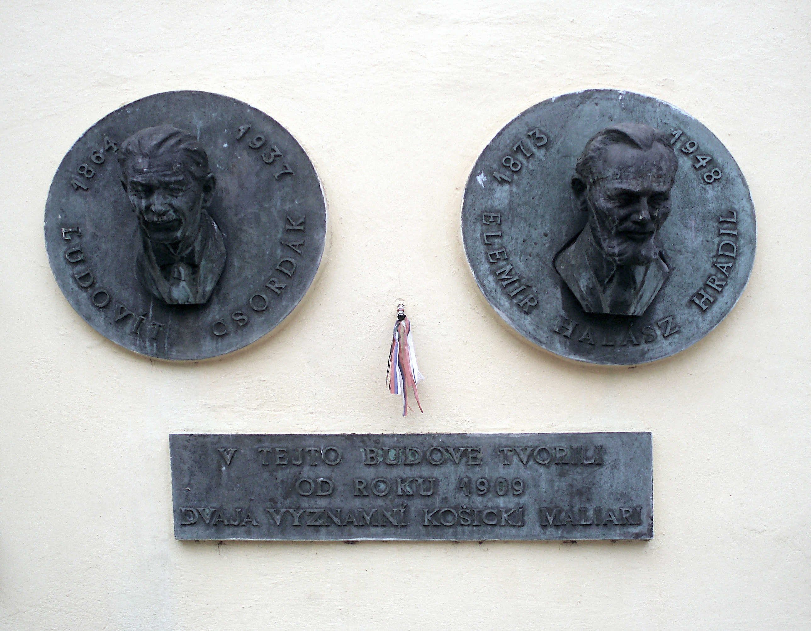 Csordák Lajos és Halász-Hradil Elemér emlékmű Kassán, Zbrojničná ul. 4